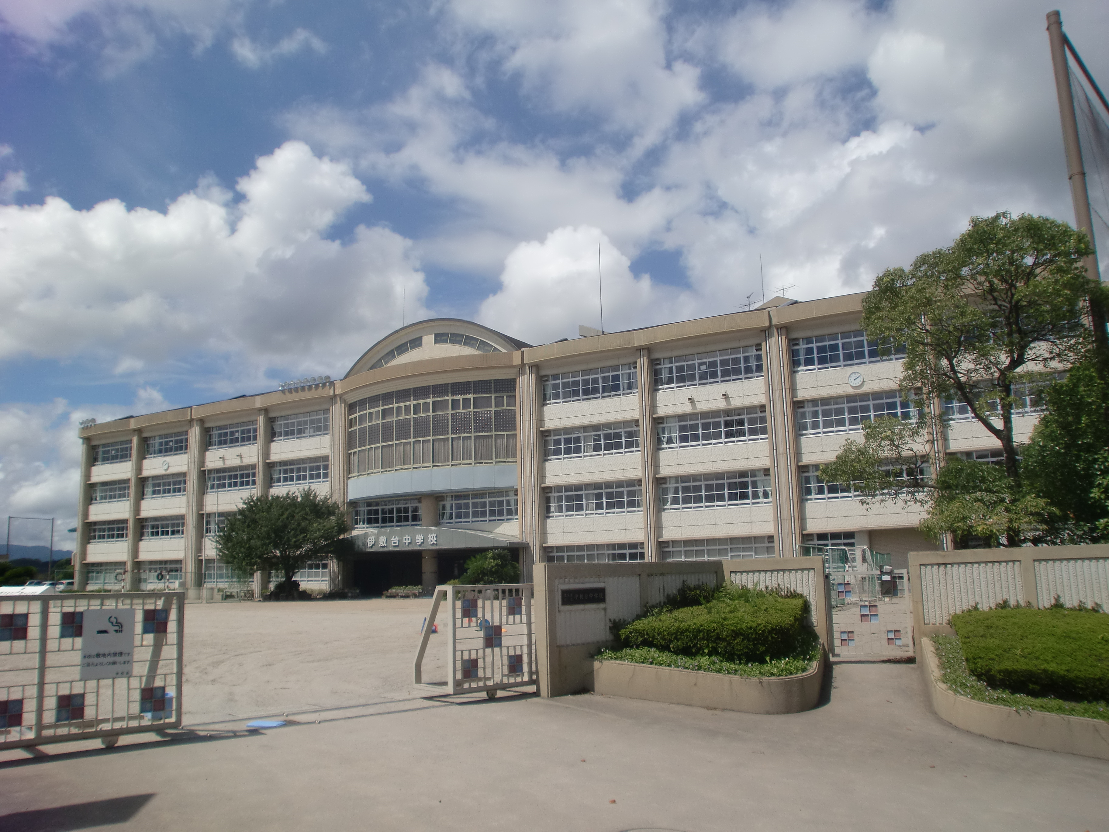 鹿児島市立伊敷台中学校の外観